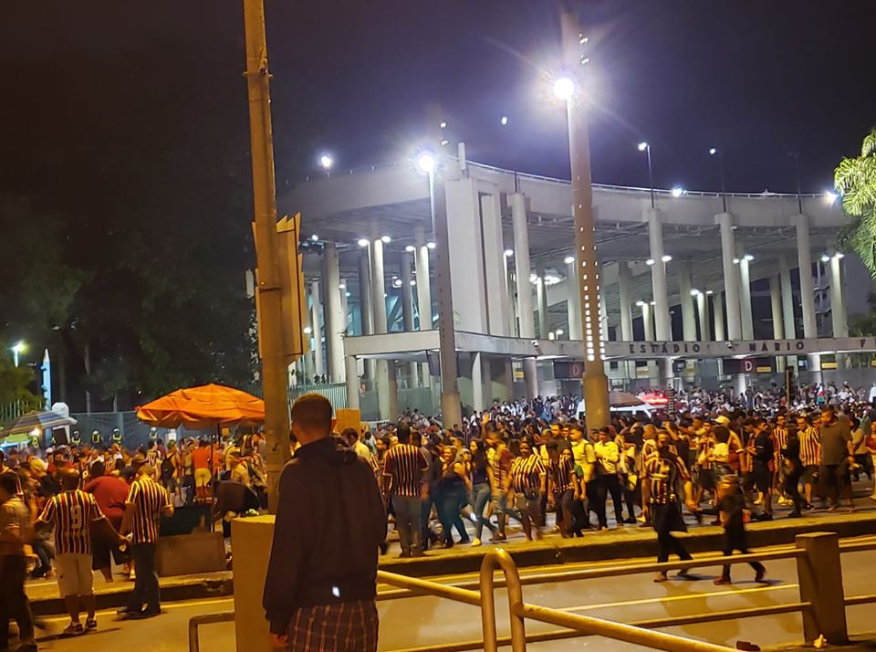 Torcida Tricolor saindo do Maracanã após a partida contra o Corinthians pela Copa Sul-Americana de 2019, na madrugada do dia 30 de agosto.